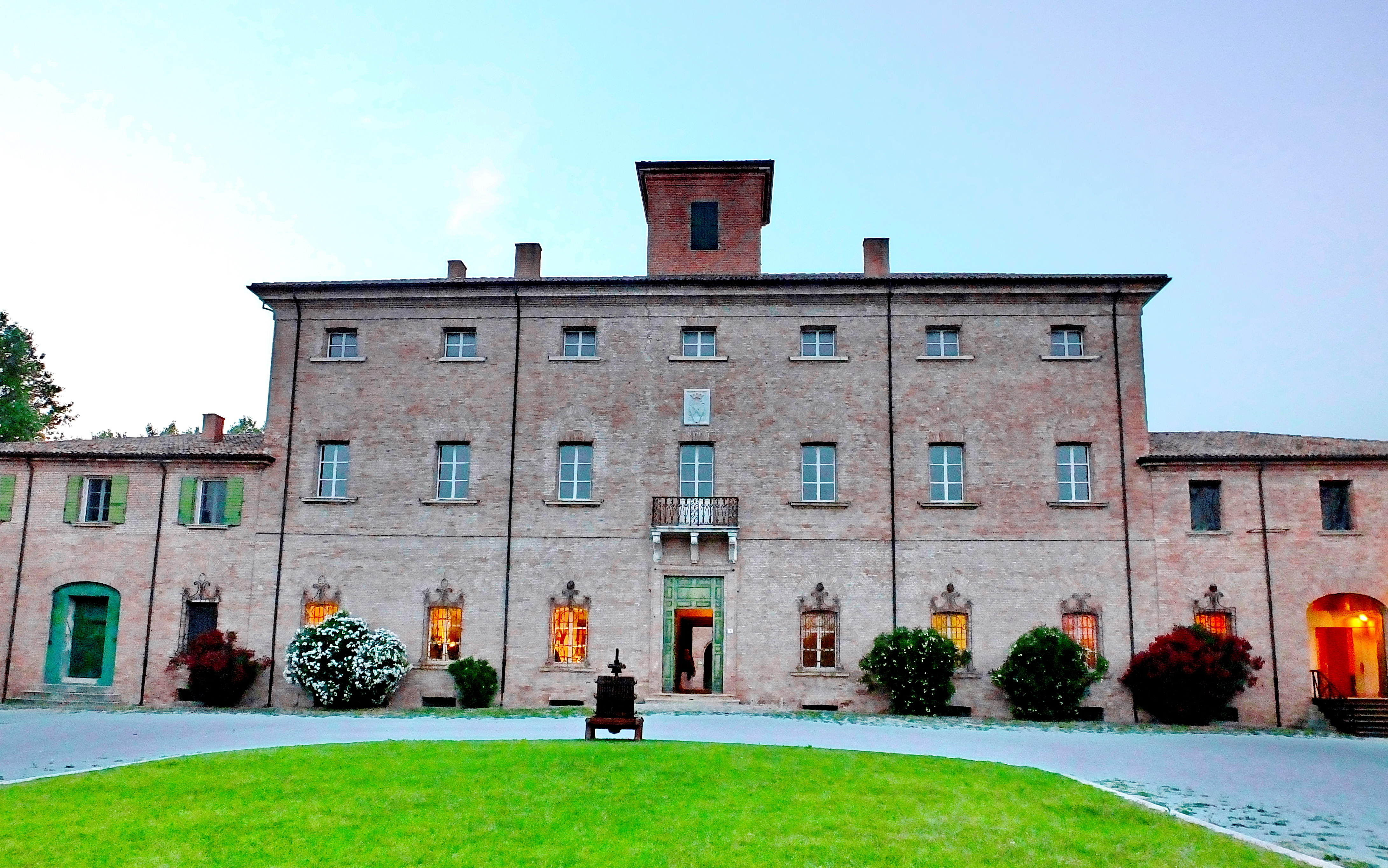 Compendio la Torre This is a photo of a monument which is part of cultural heritage of Italy.